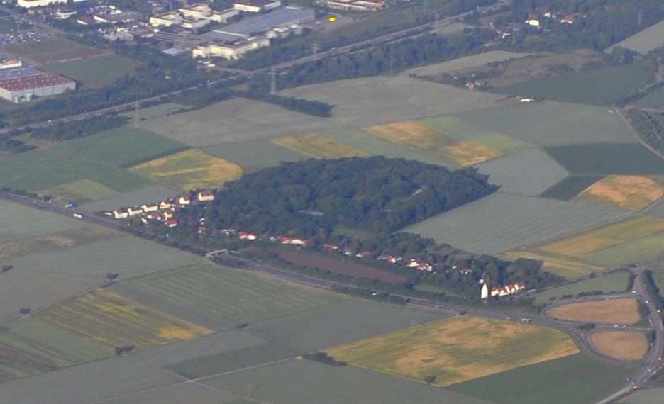 Vue aérienne de l'aéroport militaire de Erbenheim. En haut de l'image, on voit passer le fleuve le Rhin et la ville de Mayence.